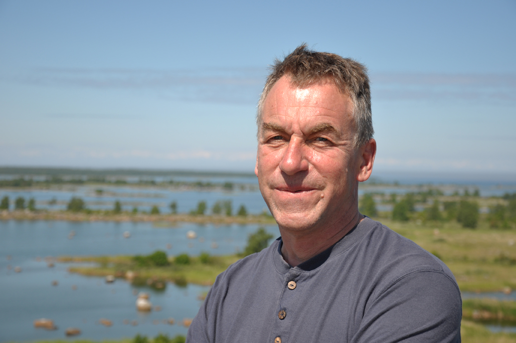 Leif Sjöström (1958–2012) var en finlandssvensk tecknare och journalist. Som tecknare är Leif Sjöström mest känd för sin tecknade serie Folkets Dagblad, en dagspolitisk serie som regelbundet ingick i Vasabladet, Västra Nyland och Åbo Underrättelser.